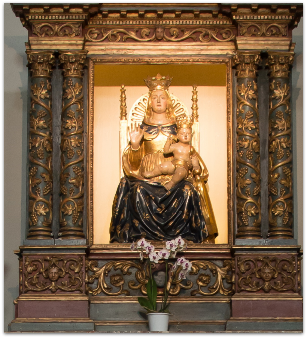 Santuario di Santa Maria di Piazza This is a photo of a monument which is part of cultural heritage of Italy.